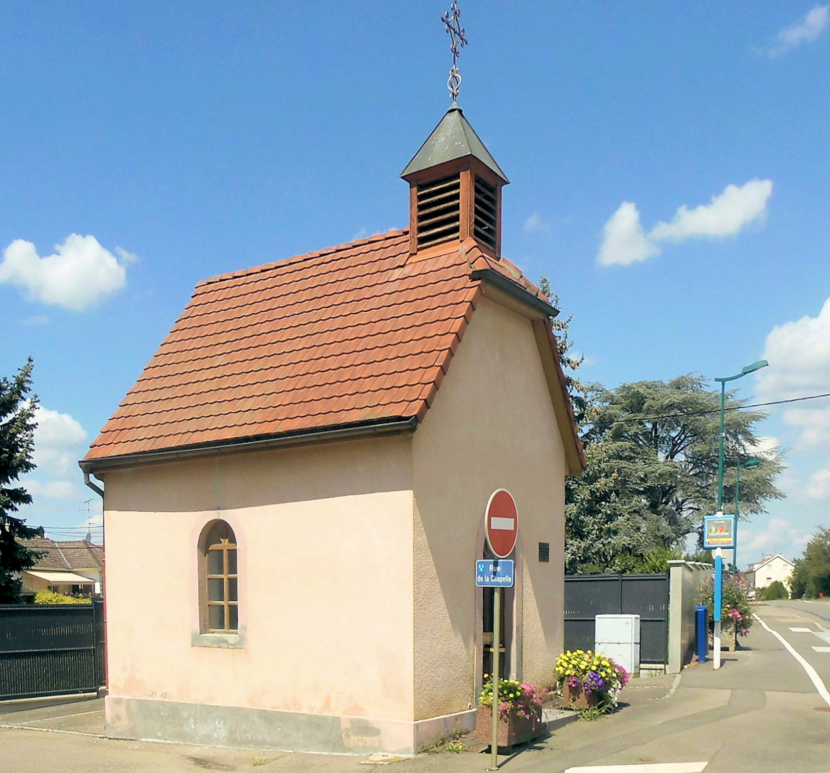 La chapelle Notre-Dame-de-Lourdes de La Chaussée, commune de Saint-Louis